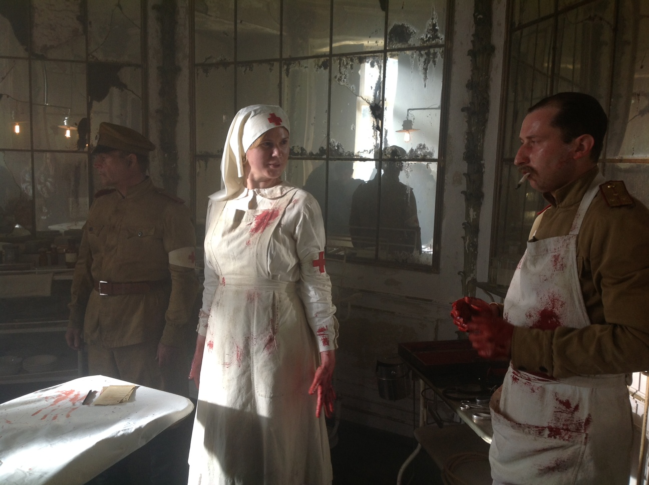 Russisches Hospital im Schloss von Frœschwiller